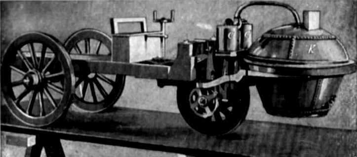 Cugnots Dampfwagen, Paris 1769. K Dampfkessel, CC Dampfzylinder; stündlich 4 km